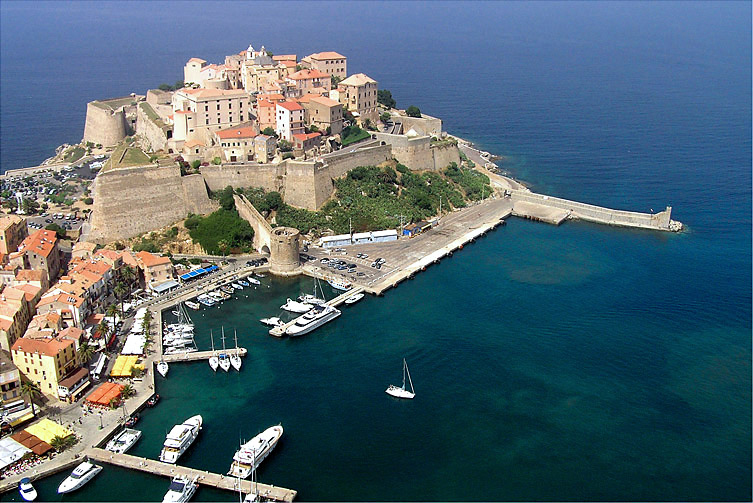 Calvi - Vue du ciel